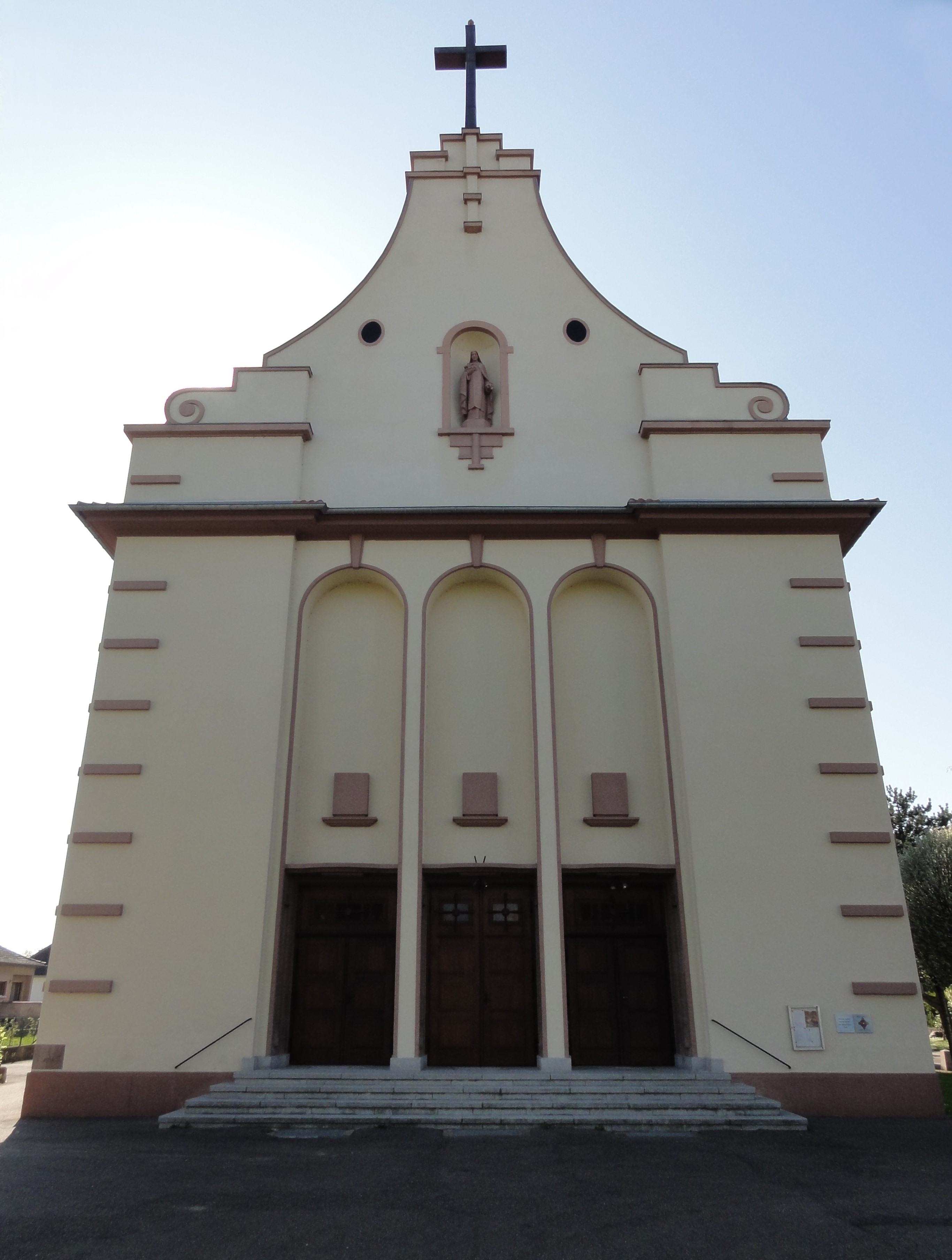 Alsace, Bas-Rhin, Geispolsheim-Gare, Église Sainte-Thérèse-de-l'Enfant-Jésus (1947), rue de la Liberté. .